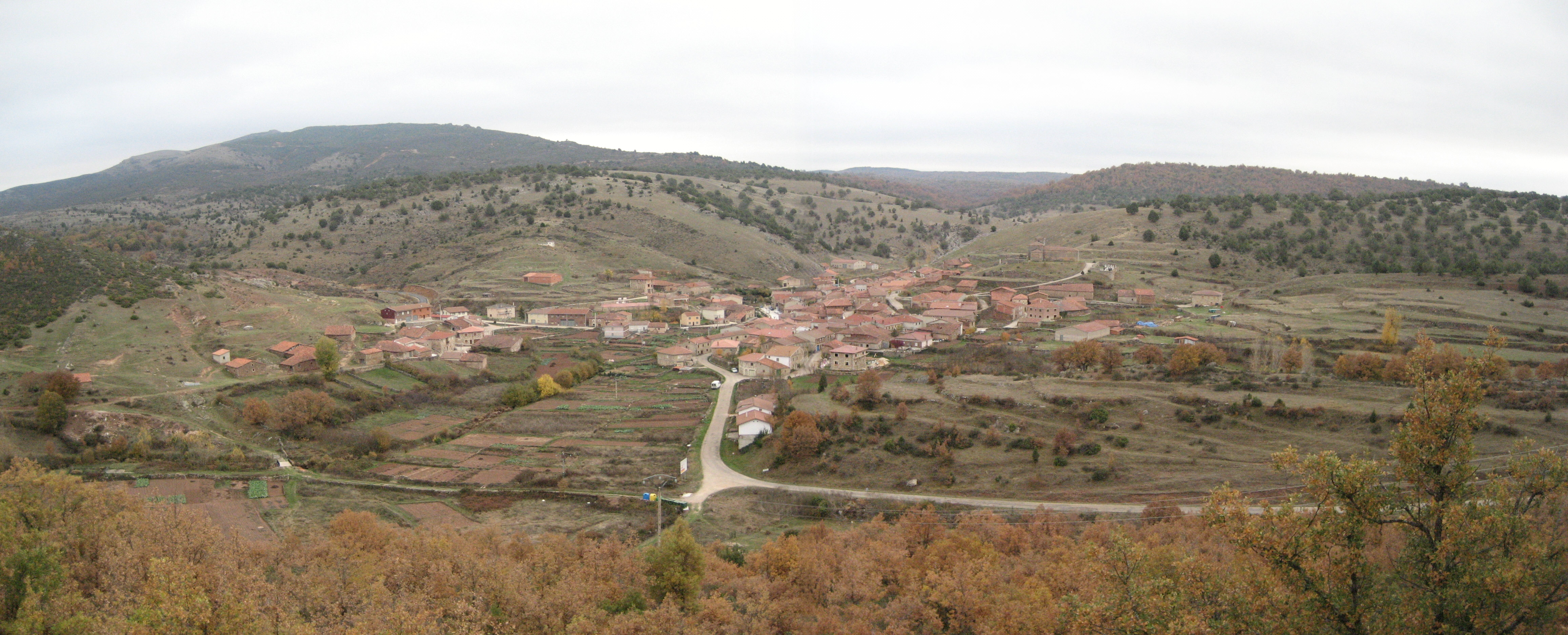 Vista general del moncalvillo de la sierra